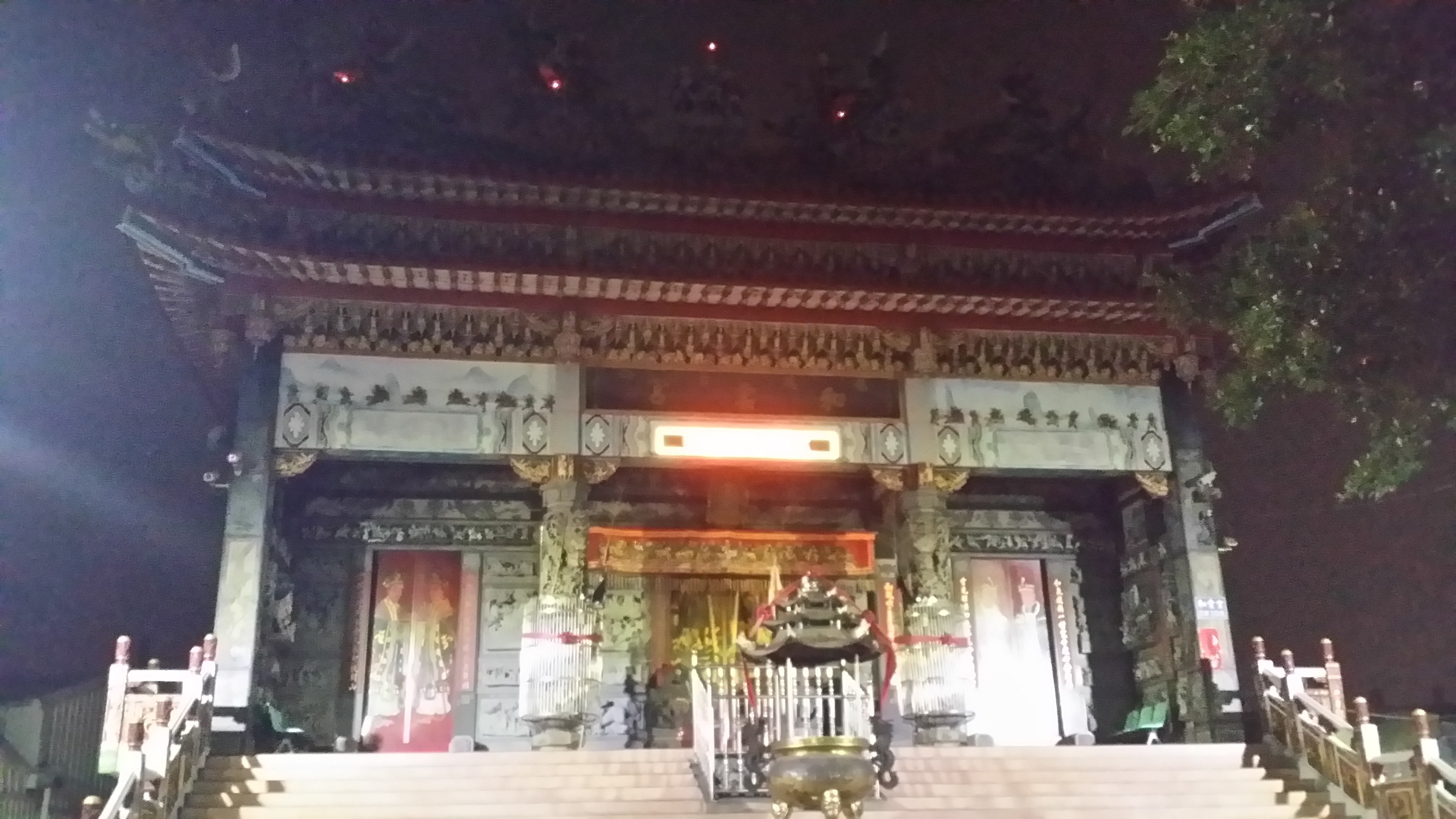 和雲宮外觀